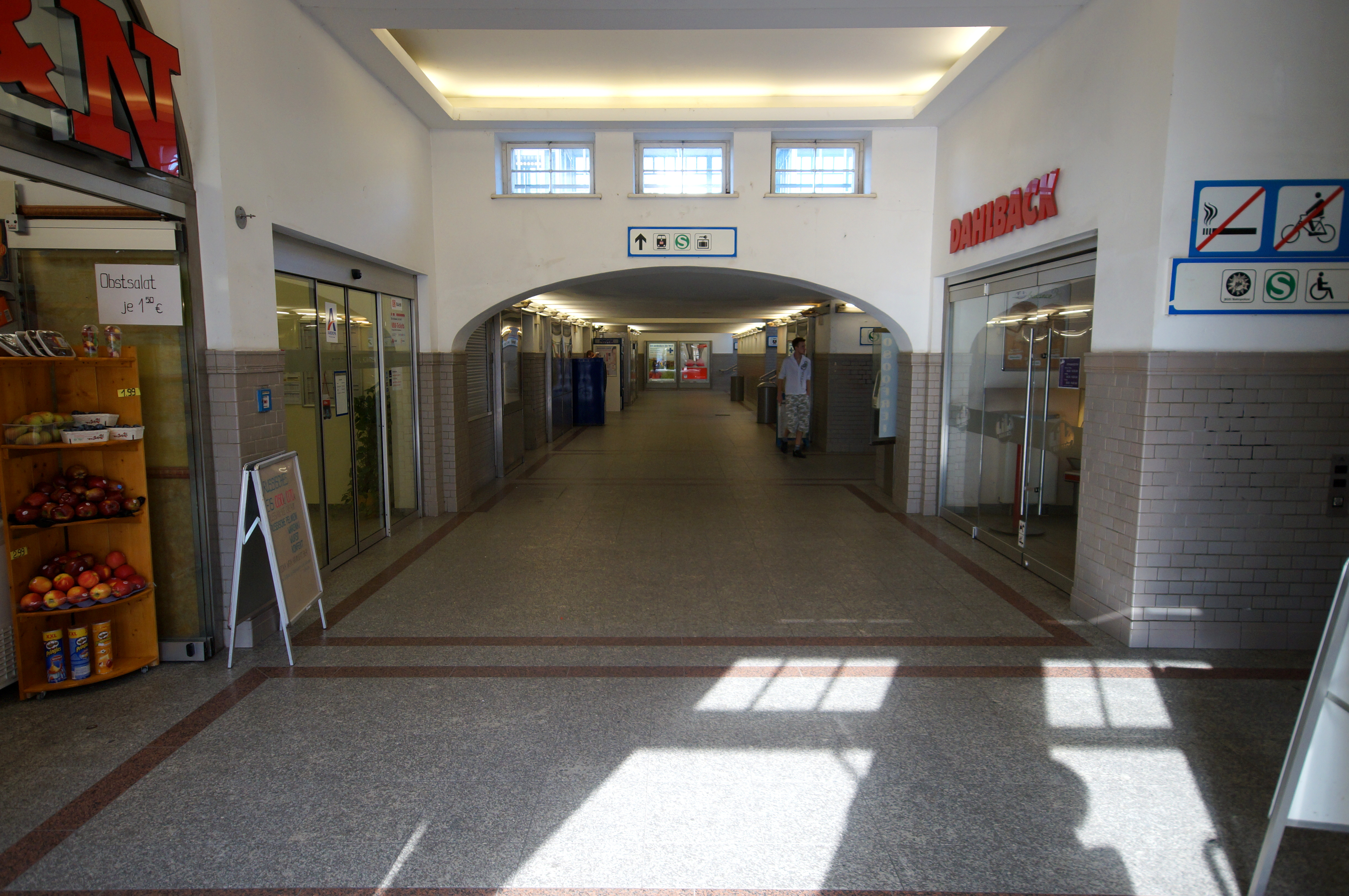 Die Eingangshalle und die Fußgängerunterführung des Bahnhofs Oranienburg